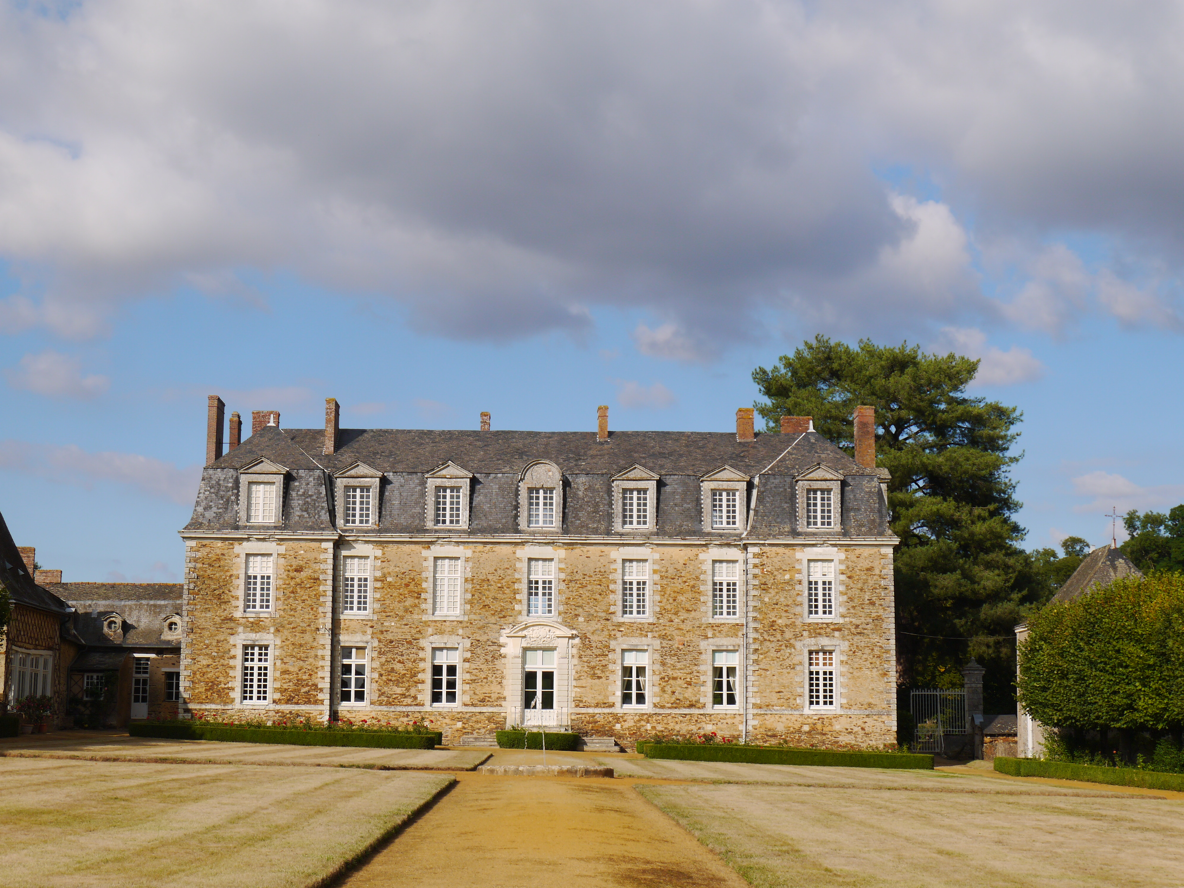 Le château en 2016.